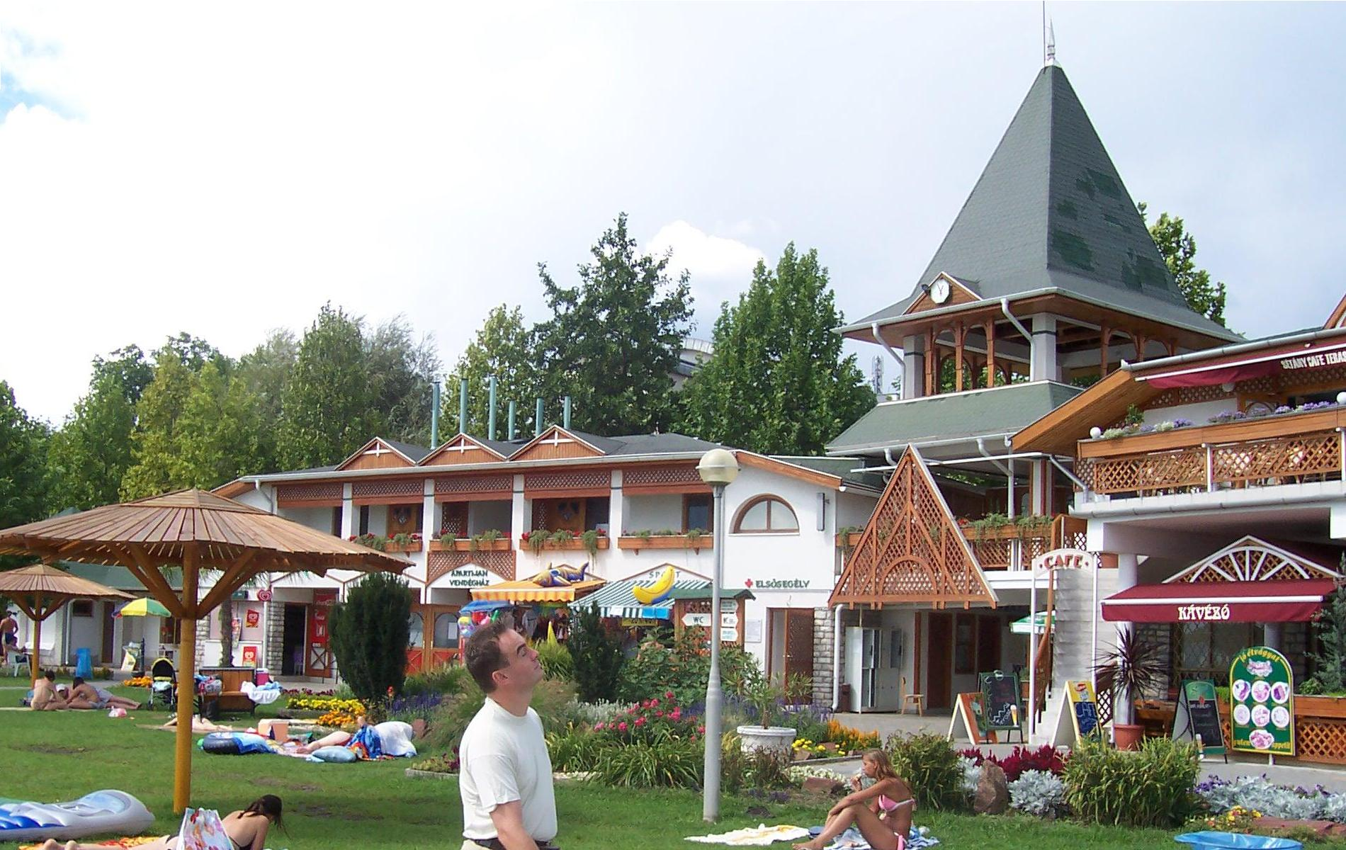 Saját kép a csopaki strandról